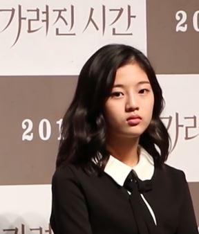 2016년 10월 11일 영화 '가려진 시간' 제작보고회